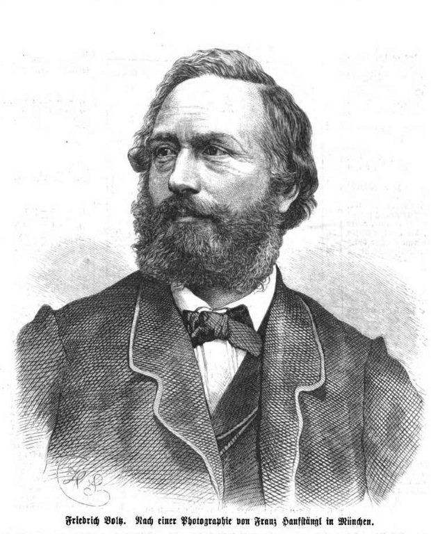 Friedrich Voltz, deutscher Maler im 19. Jh.